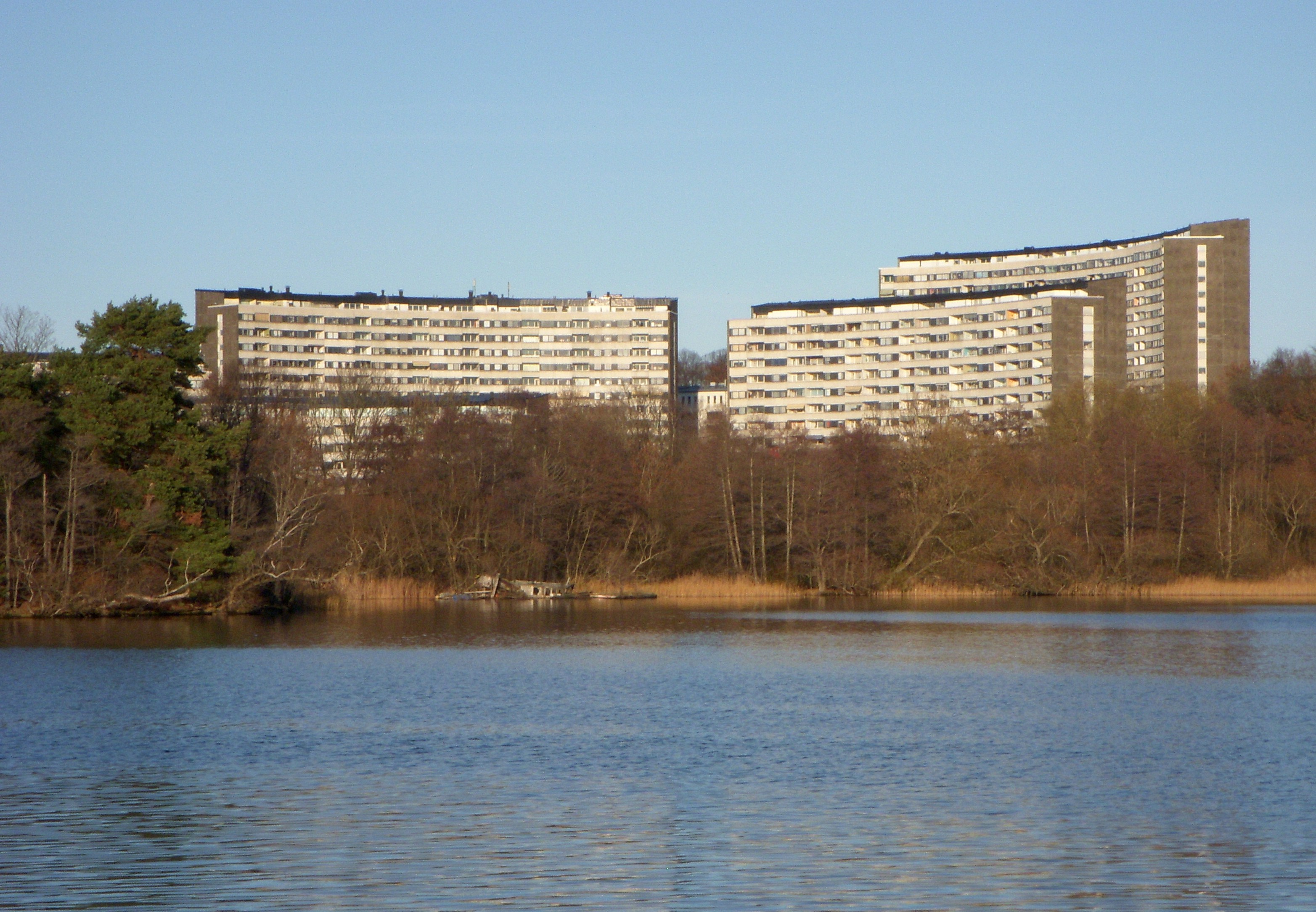 Kv Sockerbruket m.fl. över Årstaviken, arkitekt Åke Ahlström